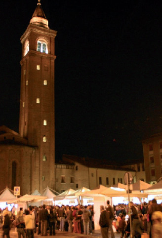 La Notte Bianca in Piazza della Libertà a Cesena nel 2006.